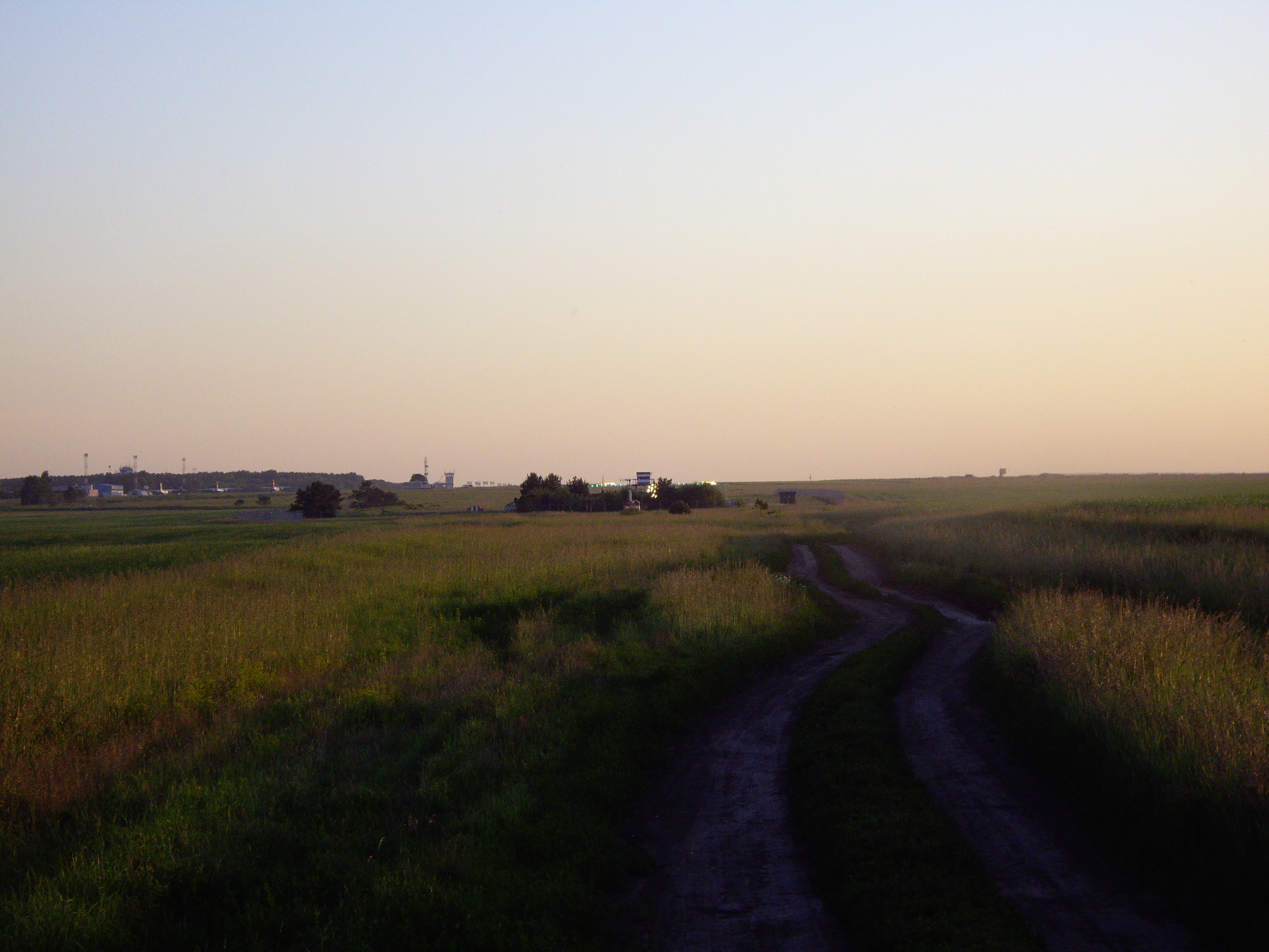 ВПП, вид с поля